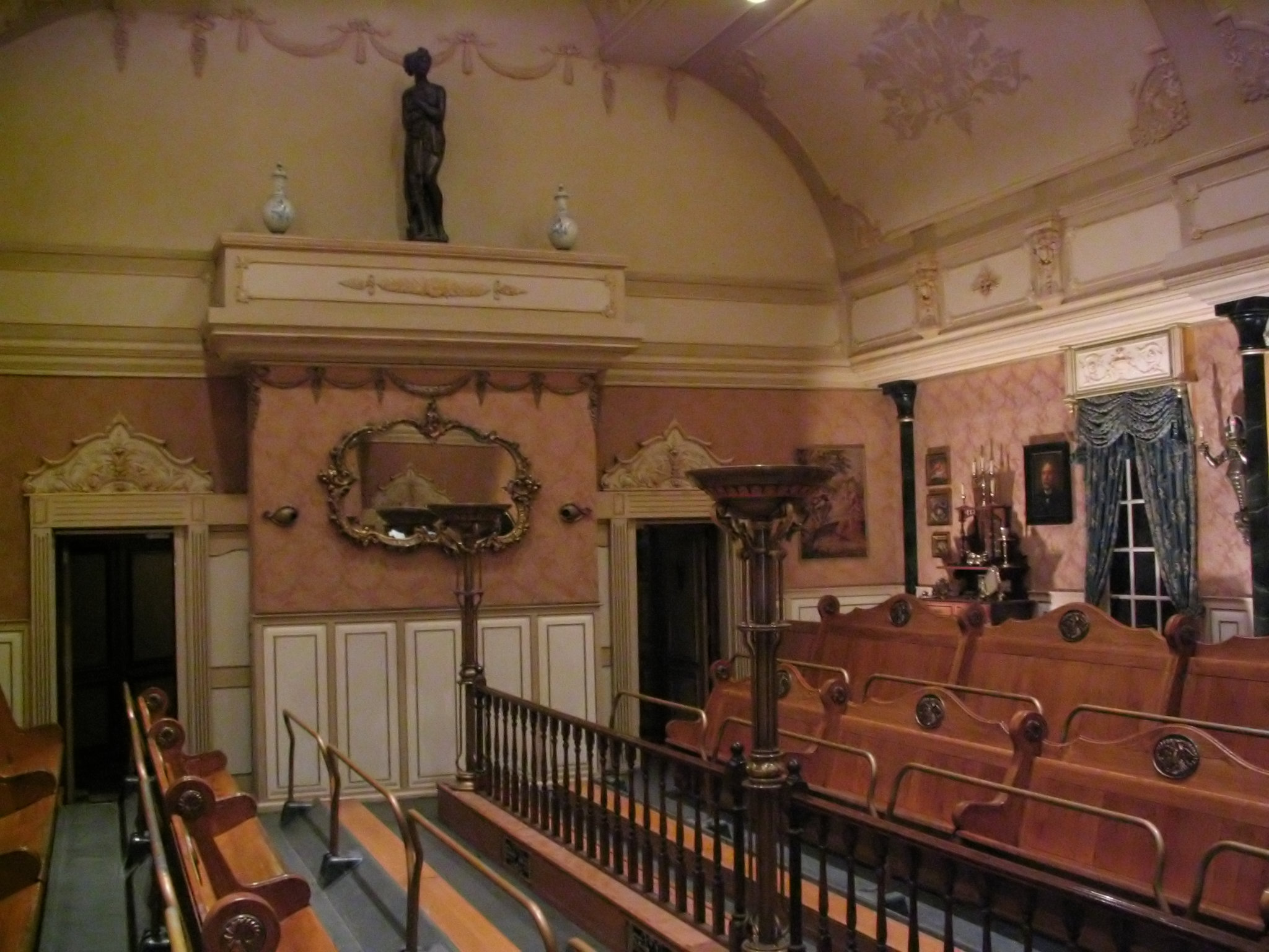 Efteling Villa Volta Inside